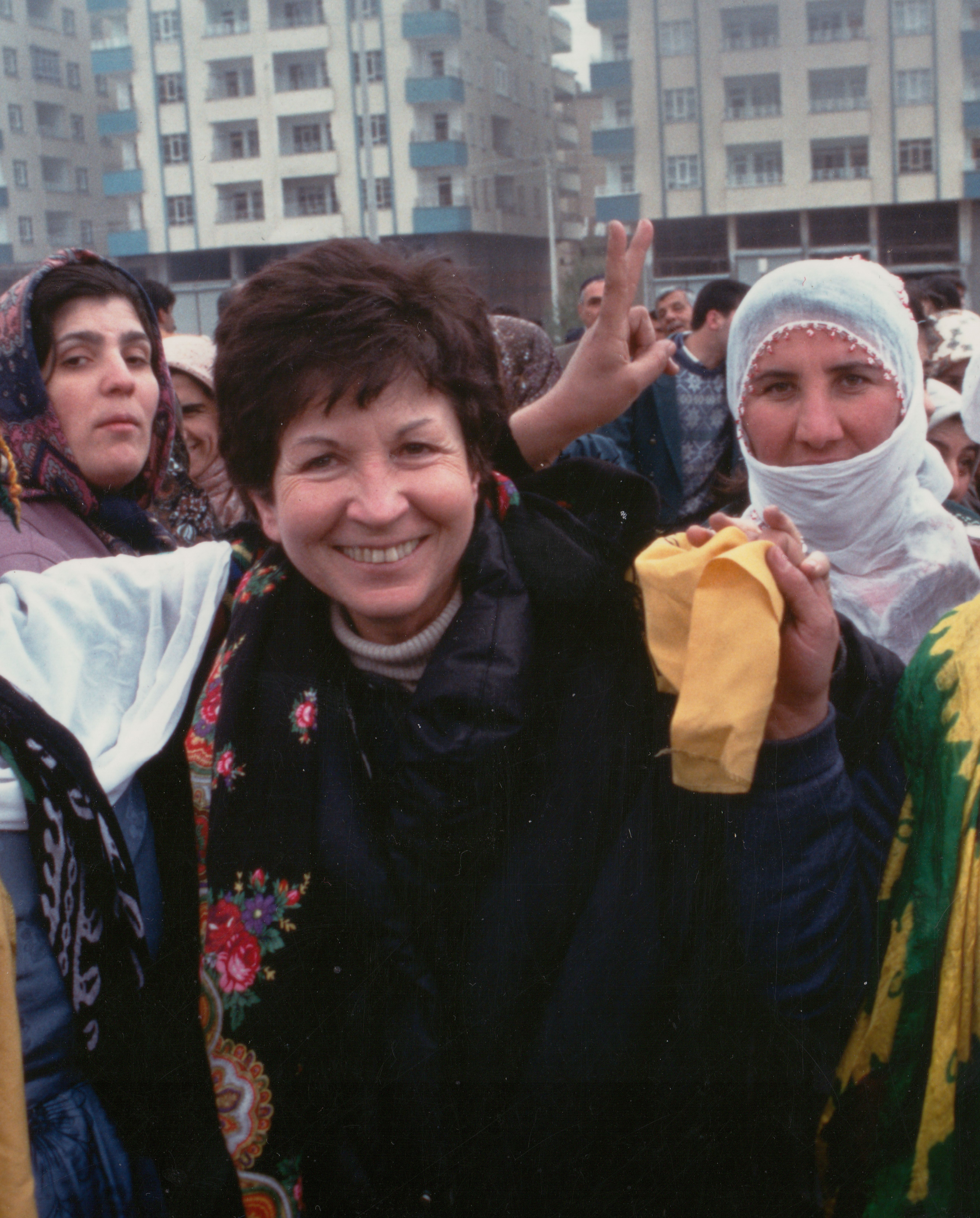 Foto di Anna Marconi